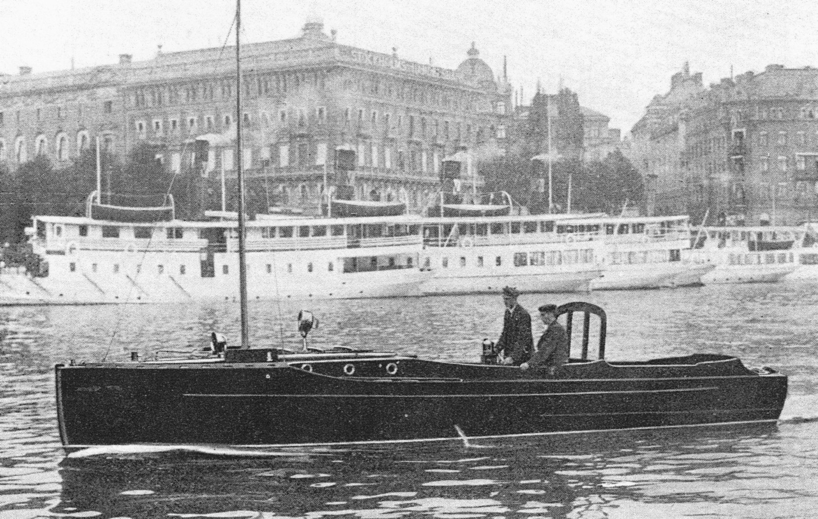 En V-båt (9,5 x 2,15 m) från Enhörna Varvs & Transport AB i Stockholm